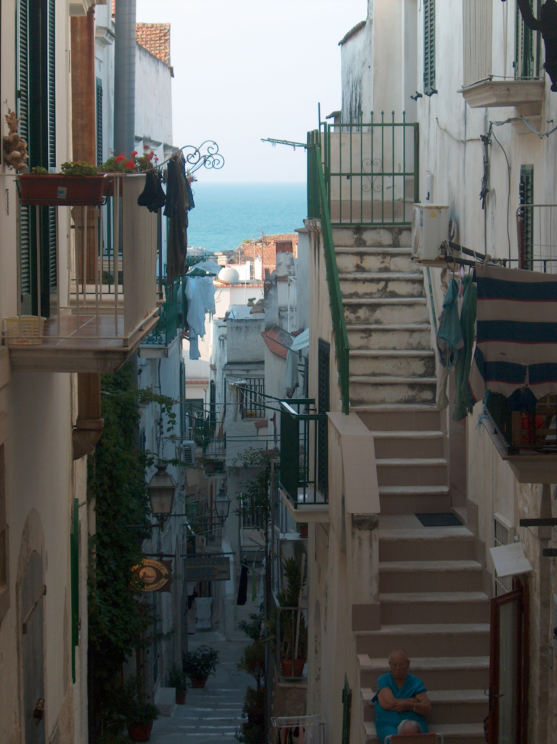 Foto di Vieste.Realizzata da L3O.